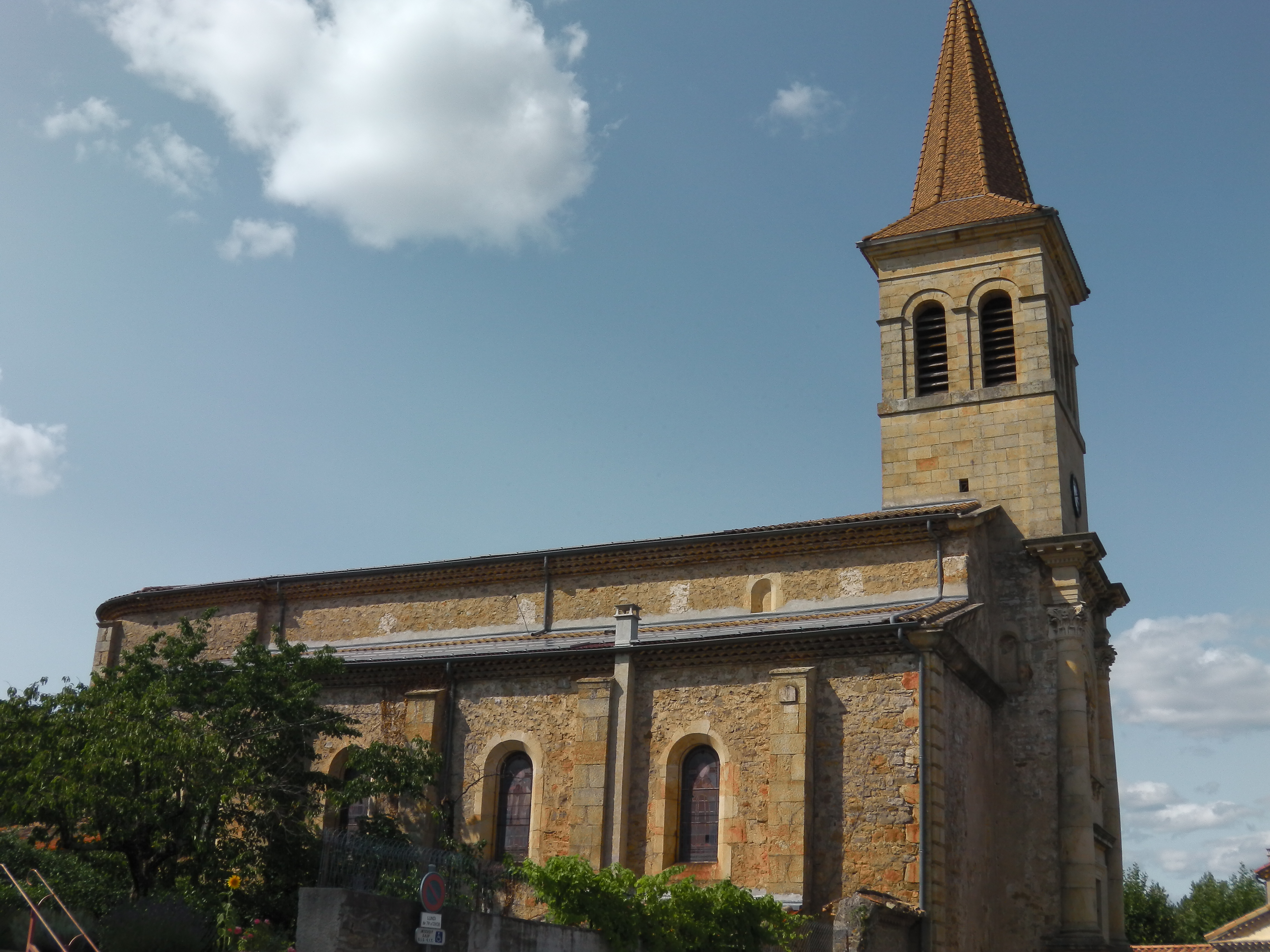 Eglise Saint-Paul de Saint-Paul le Jeune (Ardèche)